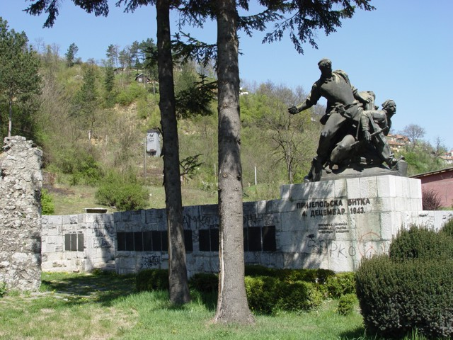 Ја, Горан Деспотовић, сам снимио слику